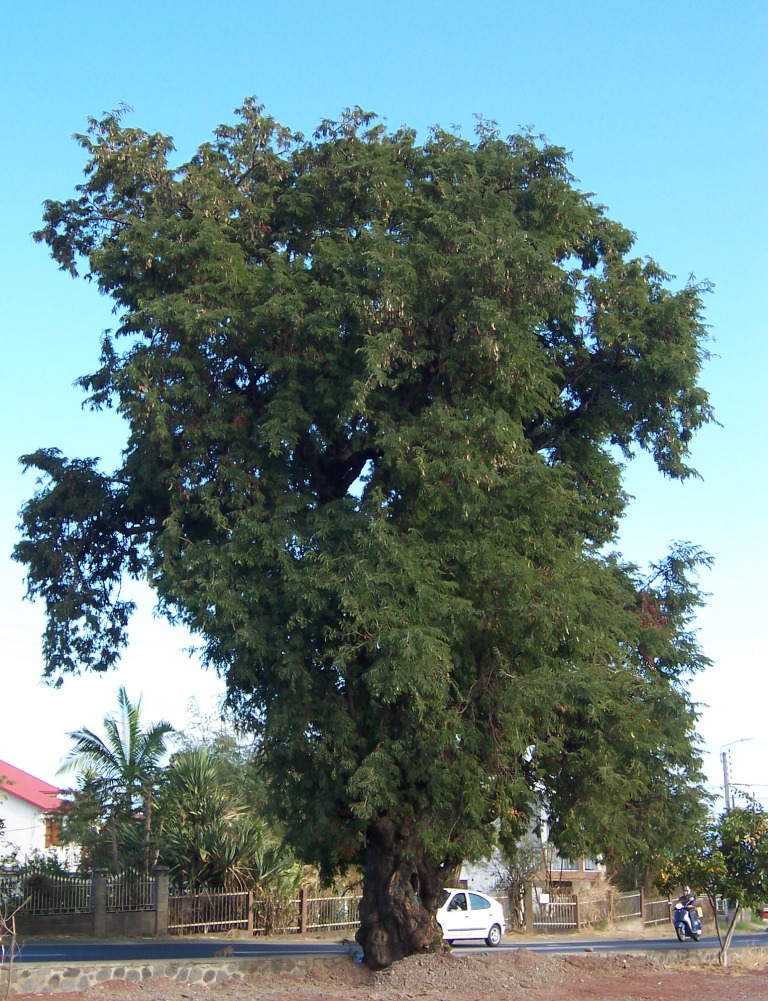 Tamarinier (Tamarindus indica) photo: B.navez - 12 SEP 2005 - Réunion Island